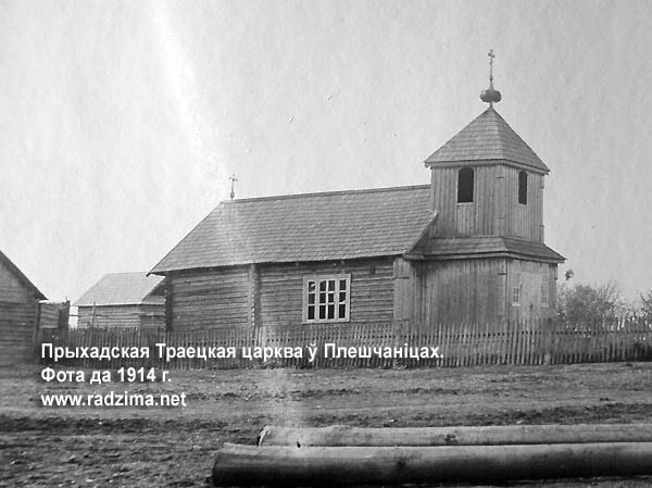 Беларуская (тарашкевіца): Плешчаніцы (Pleščanicy). Царква